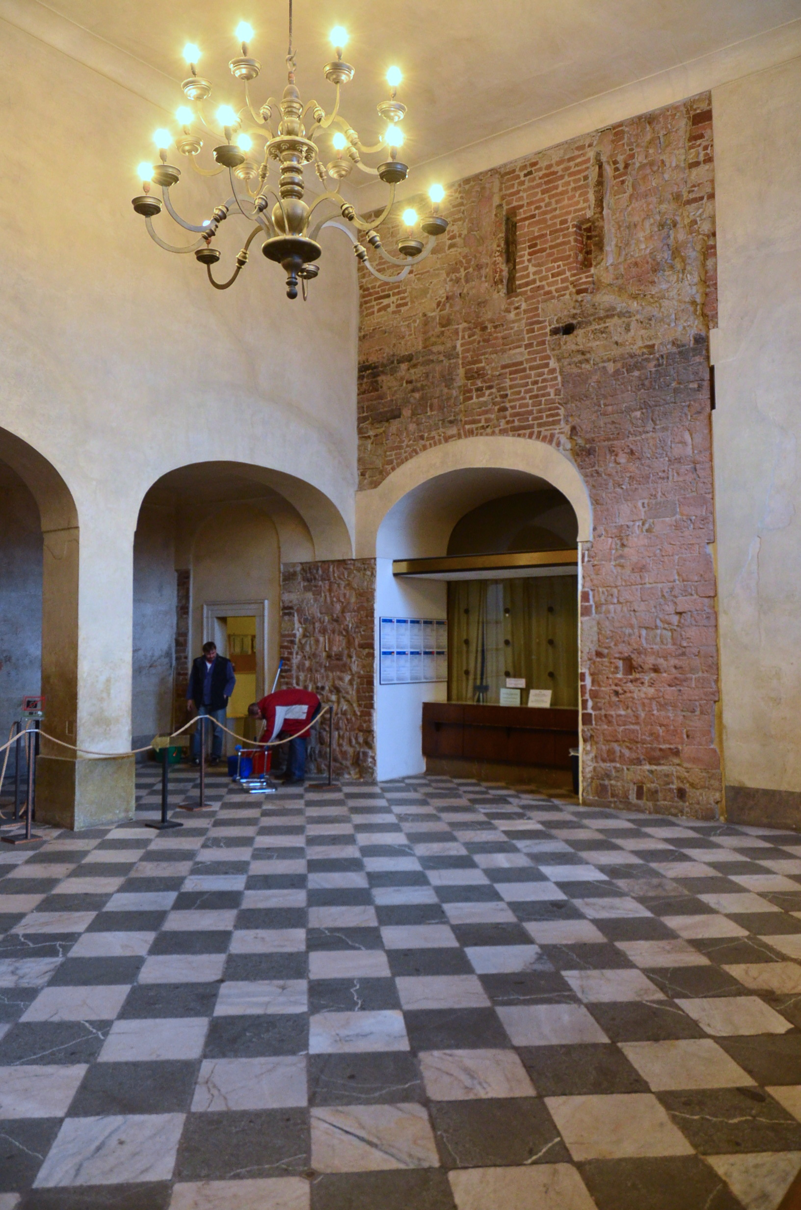 Sloupová síň (předsíň Vladislavského sálu) ve Starém královském paláci na Pražském hradě. Odhalené zdivo jižní věže raně středověkého Soběslavova opevnění hradu.